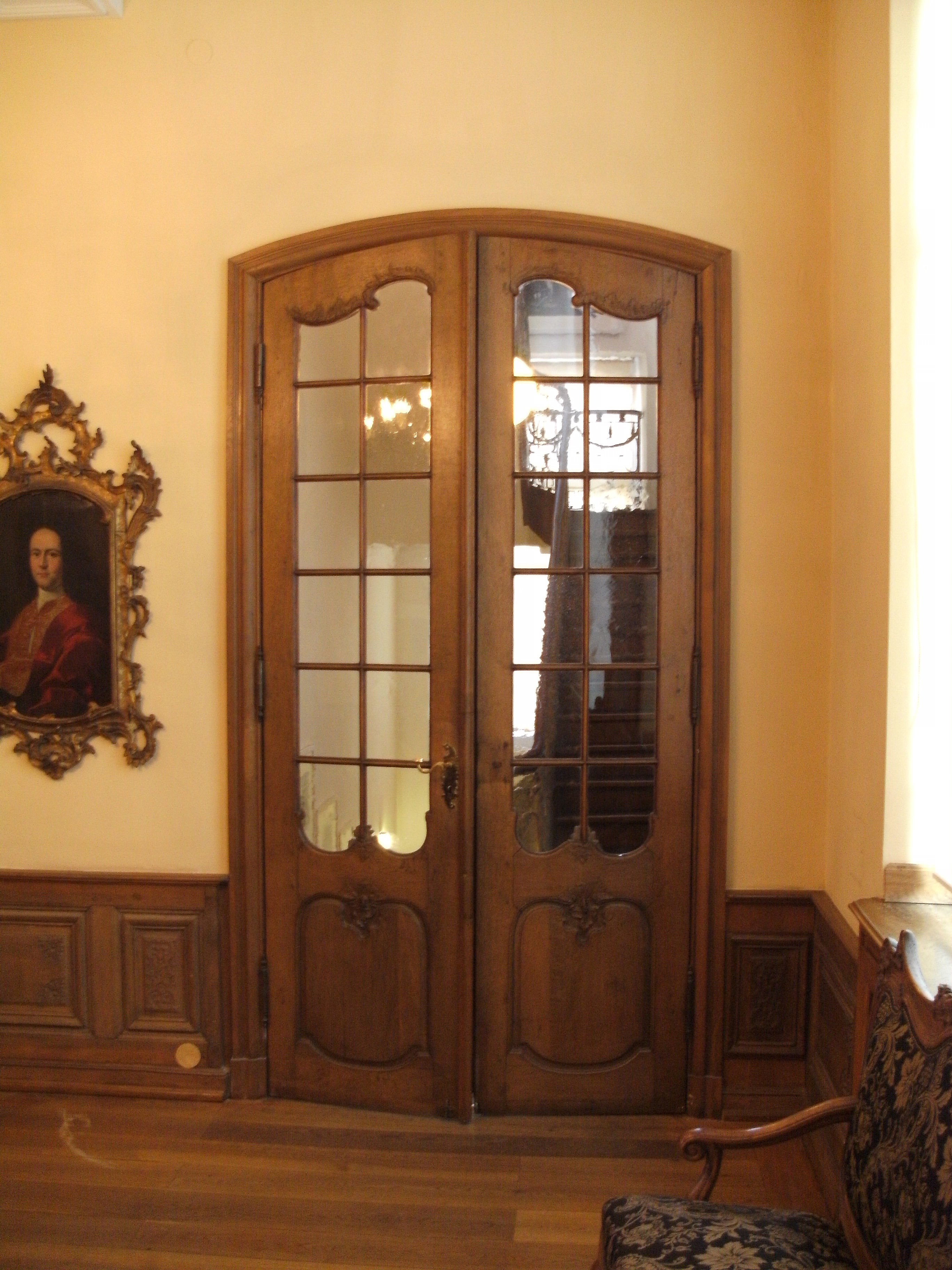 Türbogen des früheren Wespienhauses im Couven-Museum, Aachen